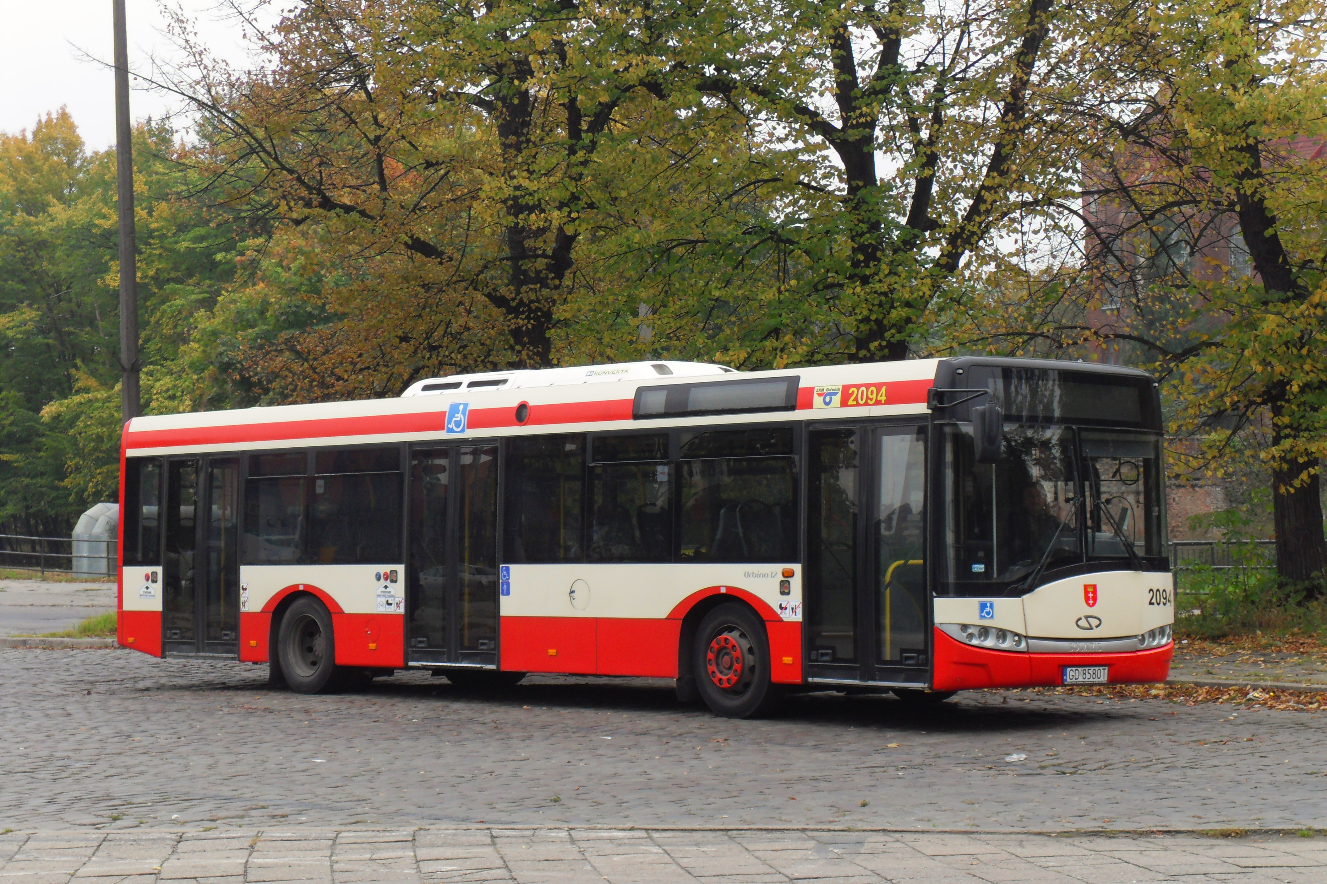 Gdańsk Śródmieście, autobus miejski Solaris Urbino #2094.